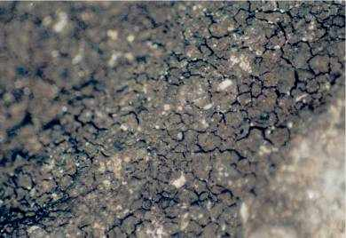 Verrucaria nigrescens